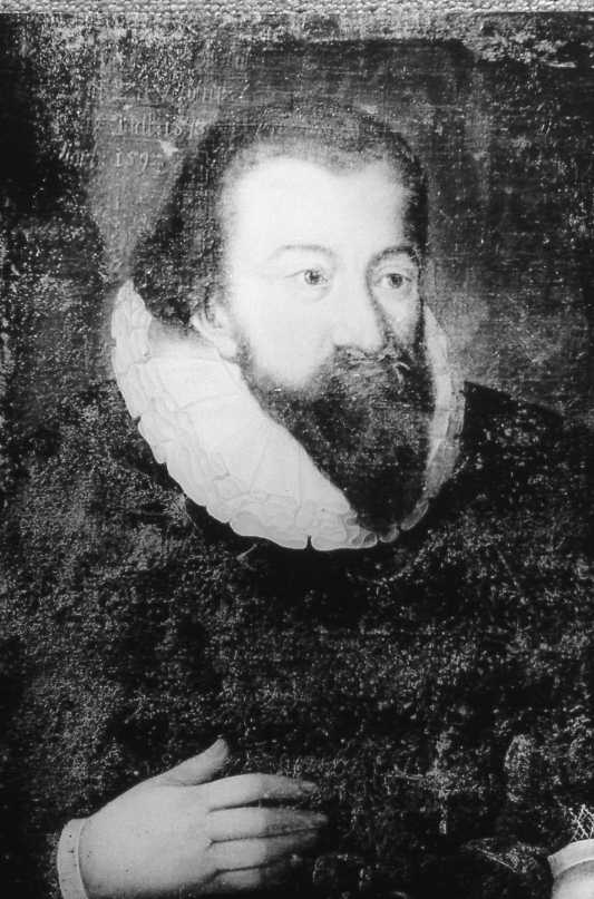 Pfalzgraf Georg Gustav von Veldenz (1564-1634)